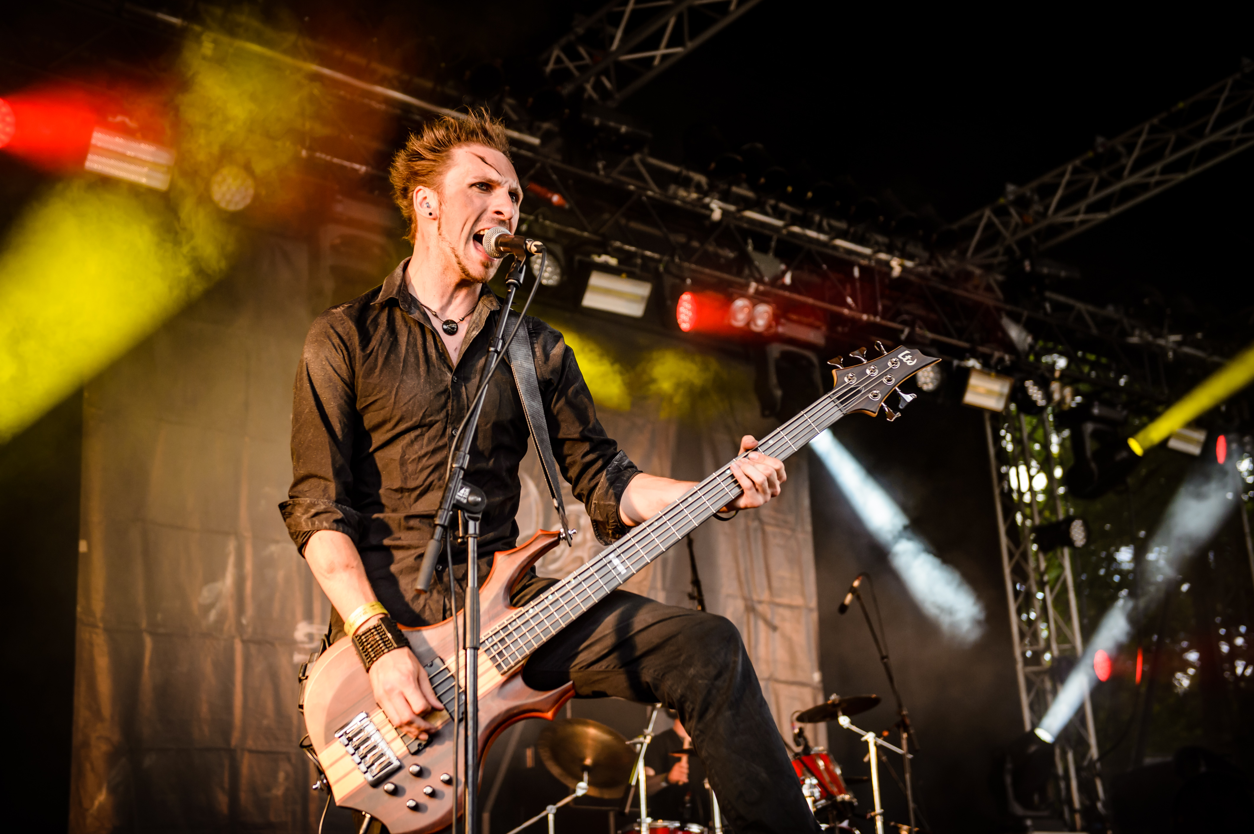 'Amphi Festival 2017; Tanzbrunnen Köln': 'Stahlmann'